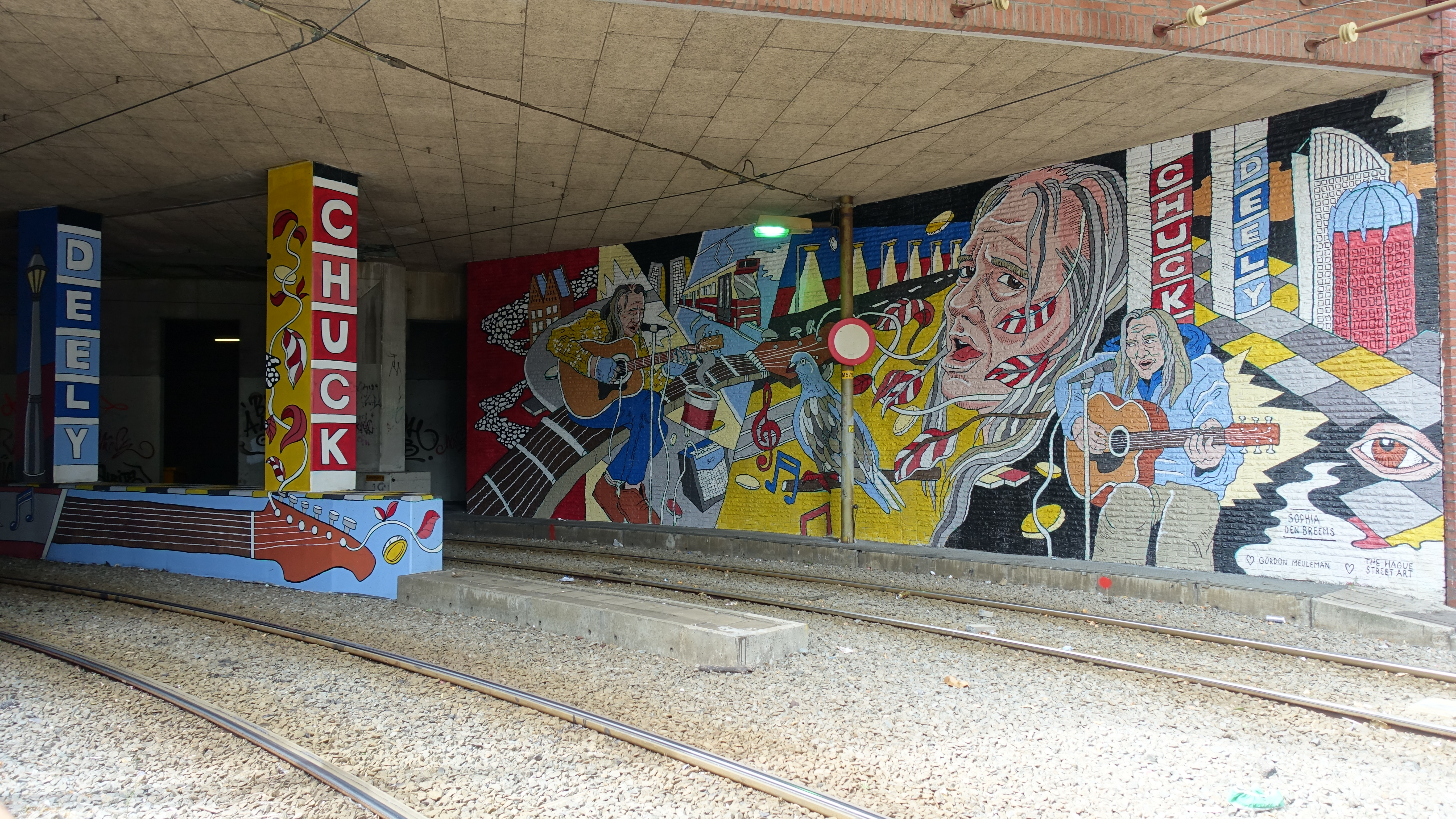 Muurschildering voor Chuck Deely, Den Haag